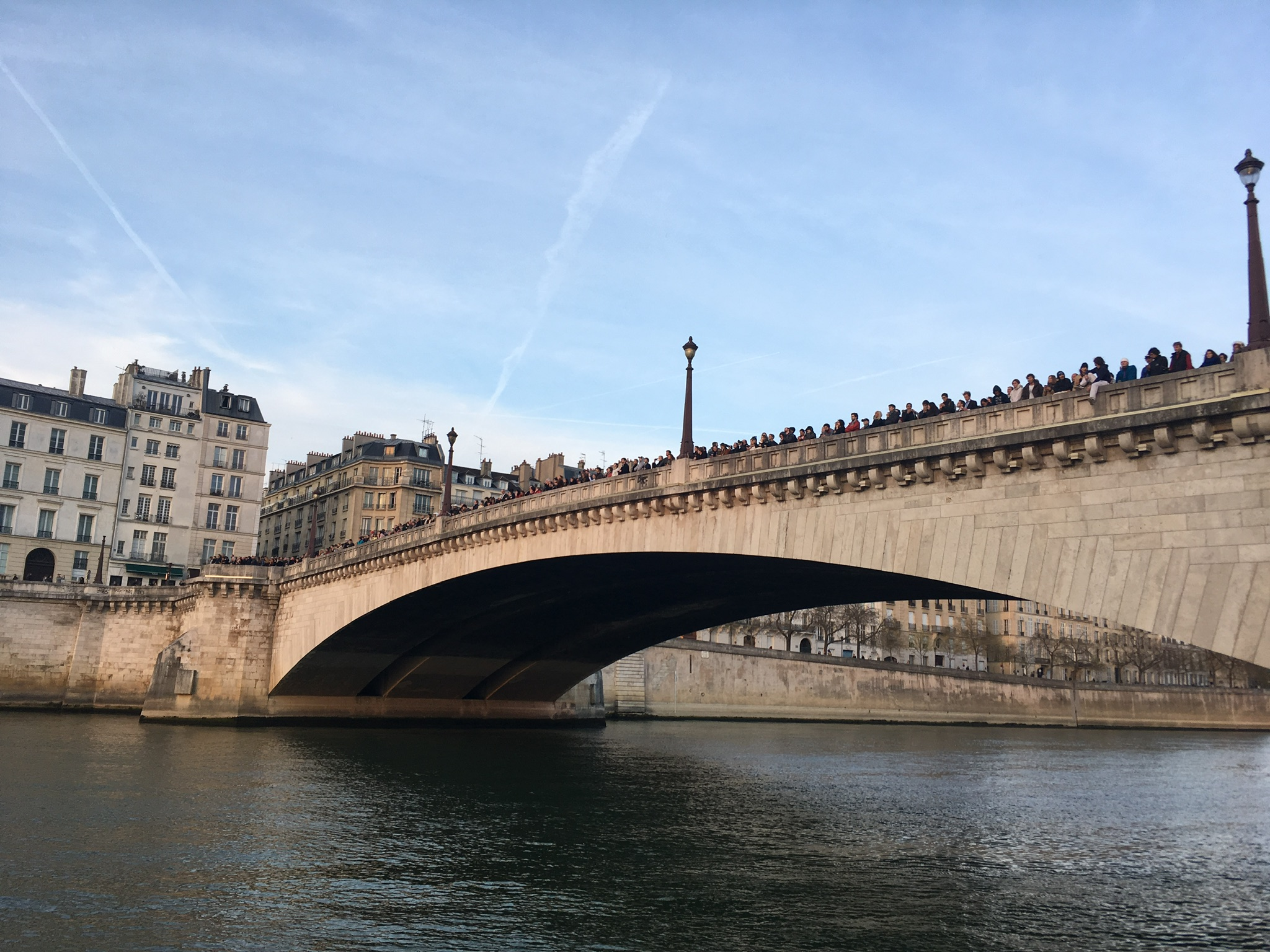 Pont de la Tournelle durant l’incendie de Notre Dame